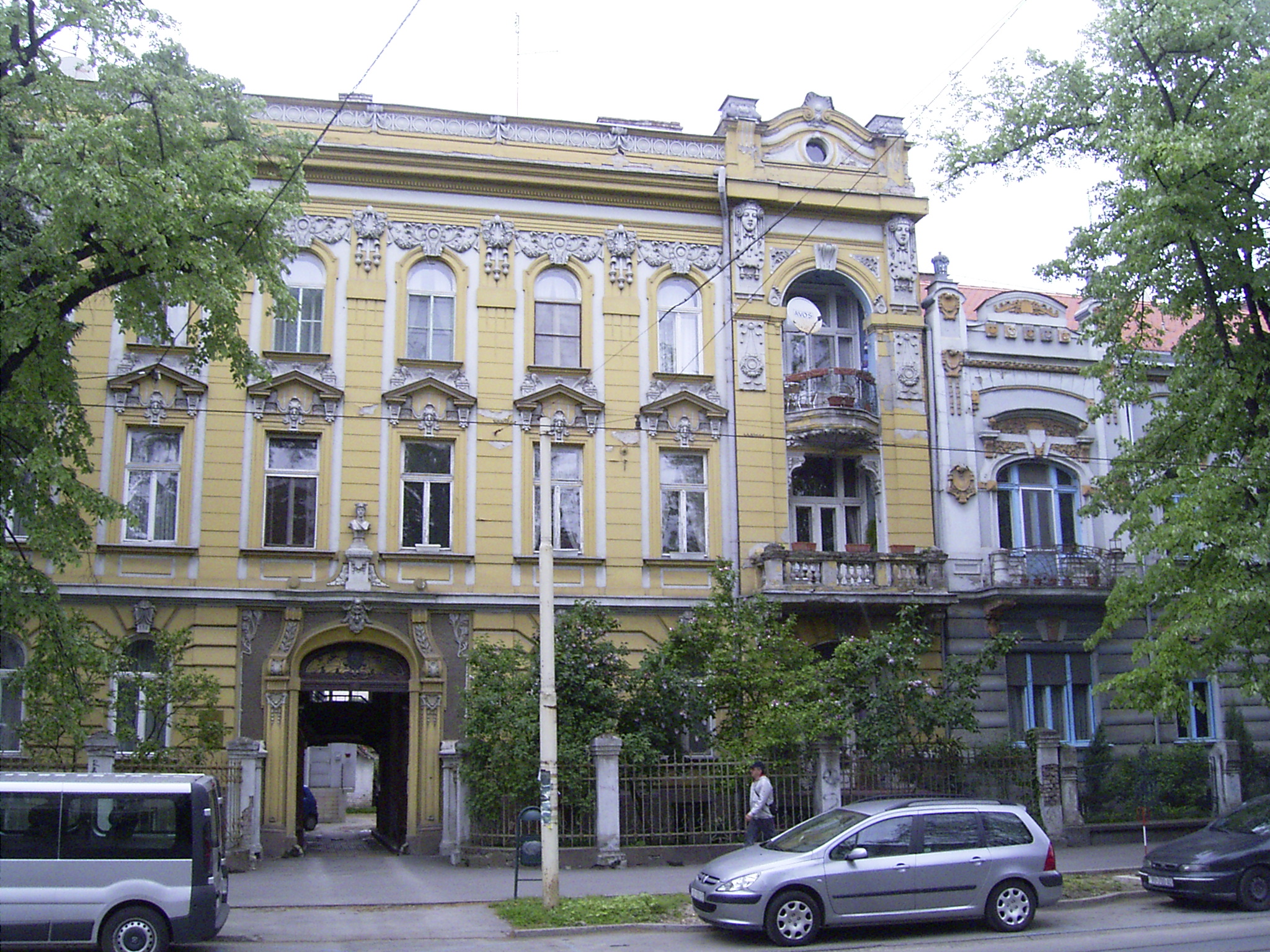 Building in european avenue (Europska Avenija), Osijek, Croatia